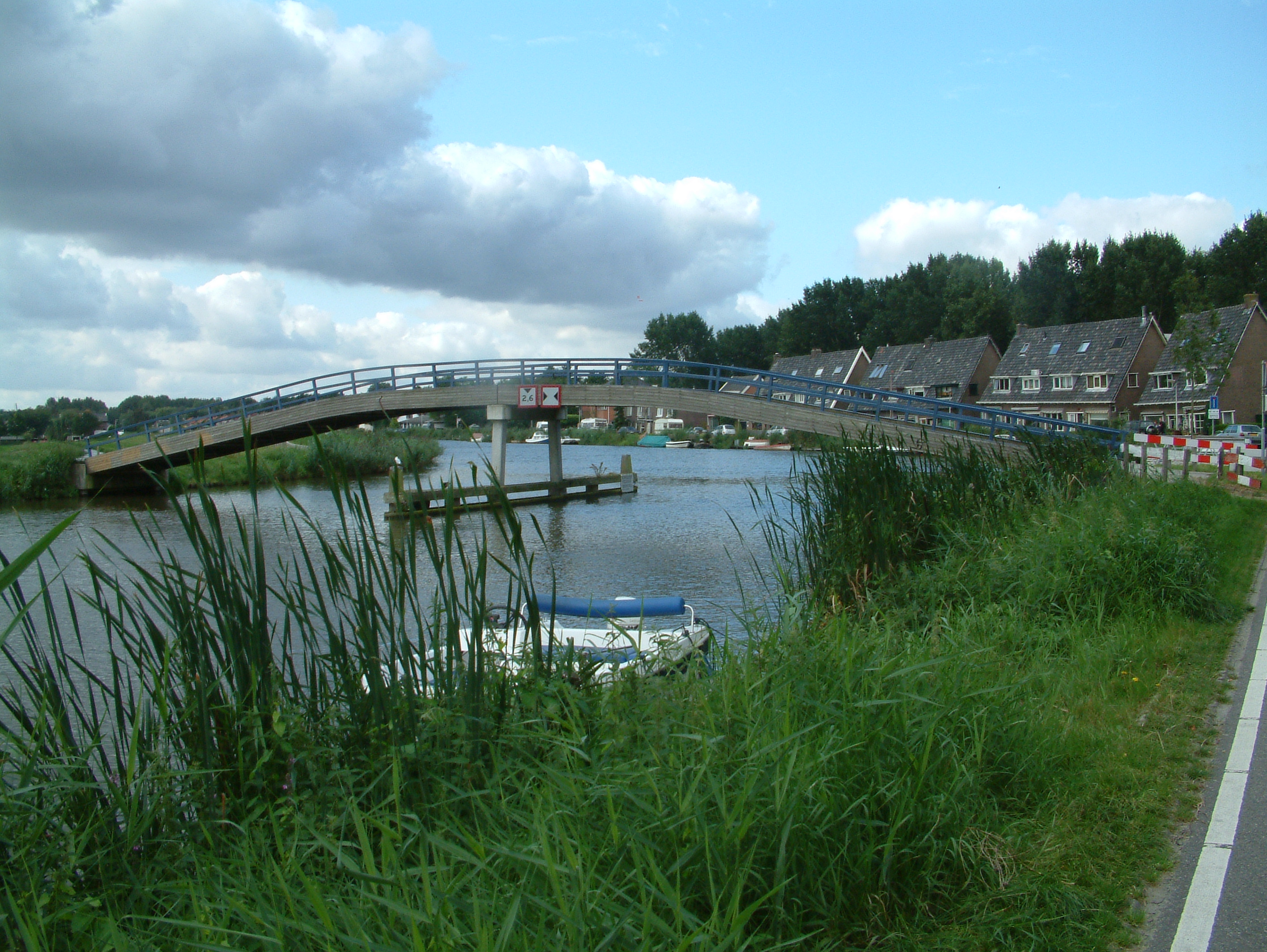 Bruggen over de Rotte